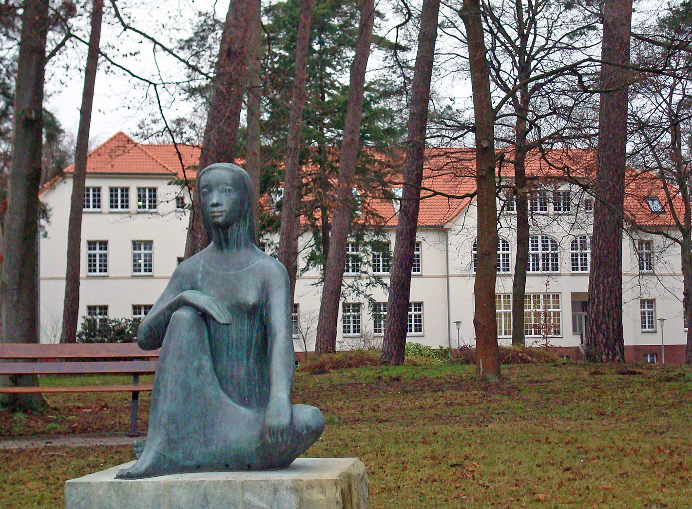 Im Park der LWL-Klinik Gütersloh